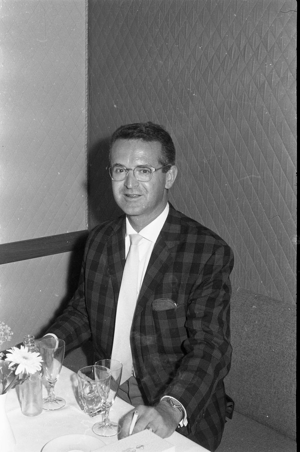 der Star-Kapelle im Tanz-Café Florida in der Dänischen Straße 12-16.